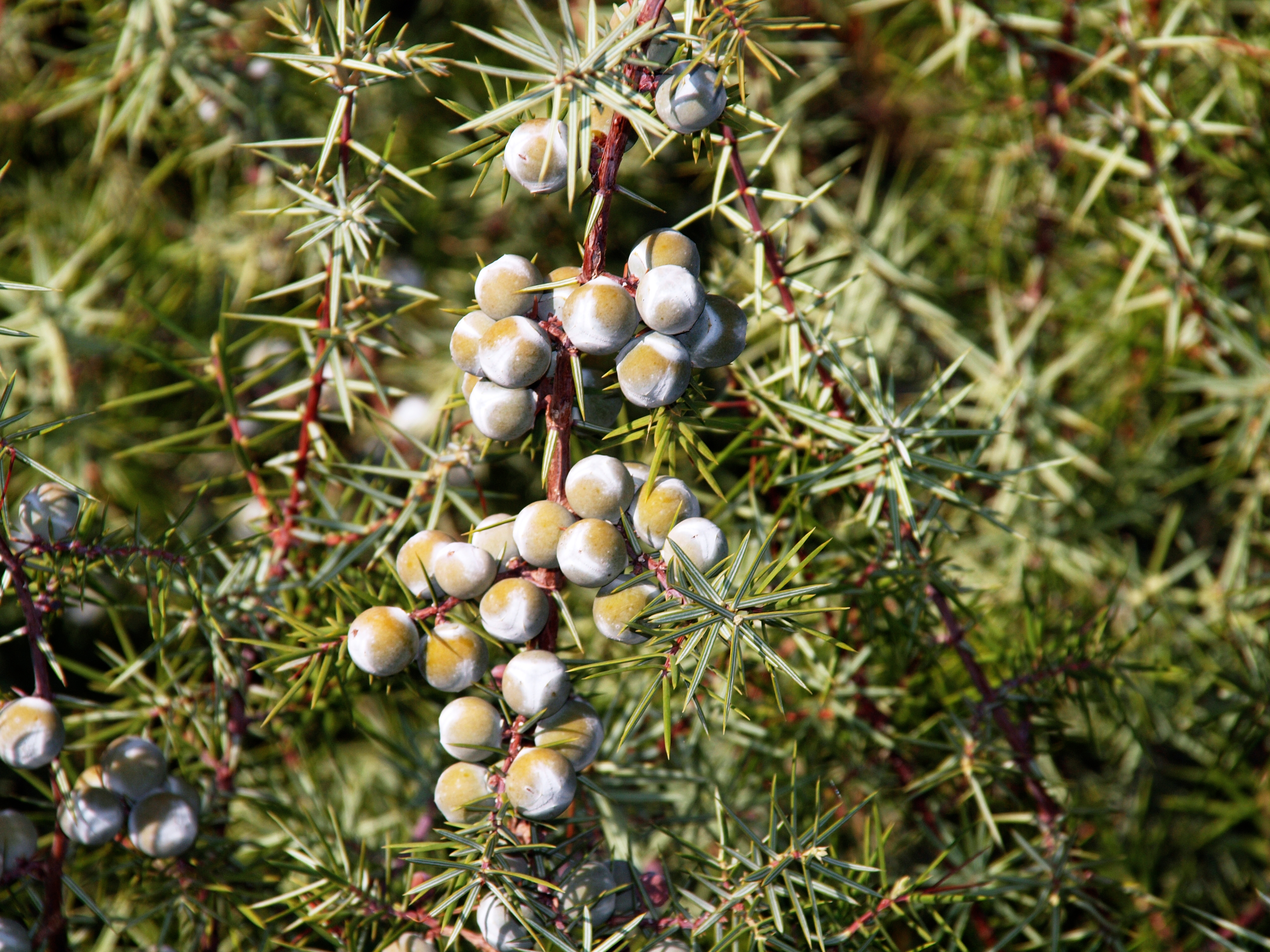 Castifao (Corsica) - Genévrier cade (Juniperus oxycedrus)